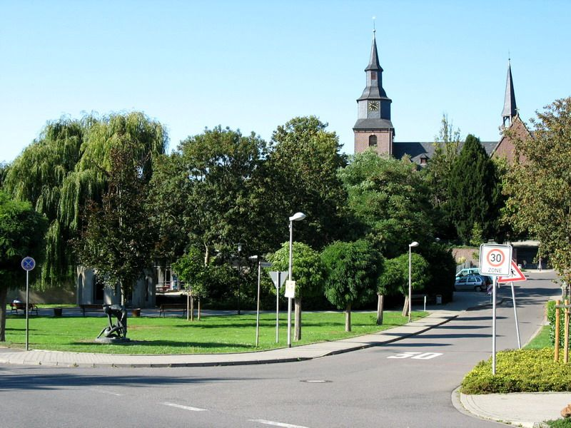 Ratheimer Dorfplatz mit Kriegerdenkmal und Blick auf den Kirchhügel